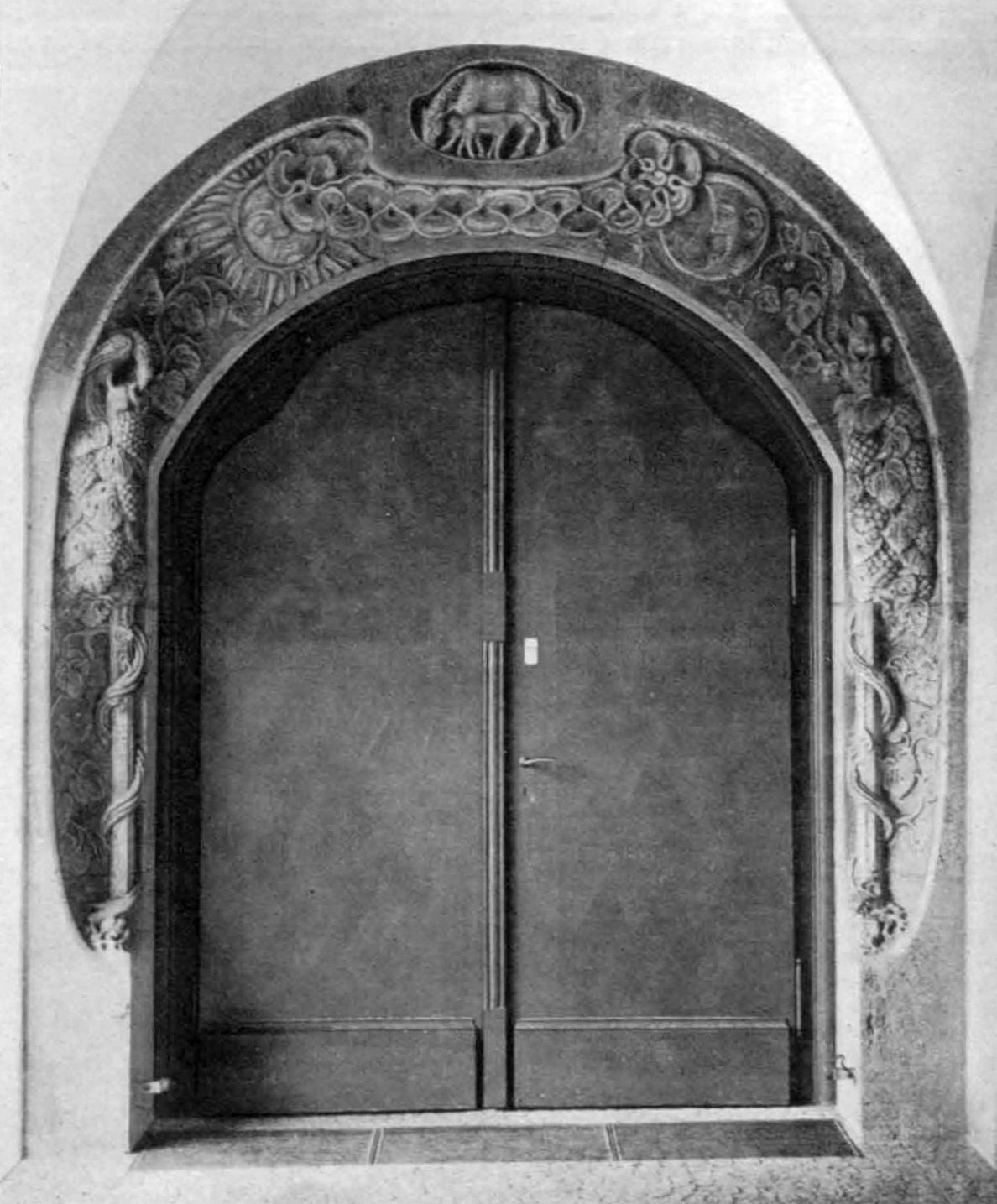 Linke Portalumrahmung der Heusteigschule in Stuttgart, Relief mit musizierenden Putten, rankenden, dicht mit Trauben behangenen Weinstöcken, Sonne und Mond sowie der säugenden Stute des früheren Stuttgarter Stadtwappens, 1905/1906, Stuttgart, Heusteigschule, Heusteigstraße 97. Die hölzernen Türflügel bilden im oberen Abchluss einen Fischerbogen, ebenso das Laibungsrelief.